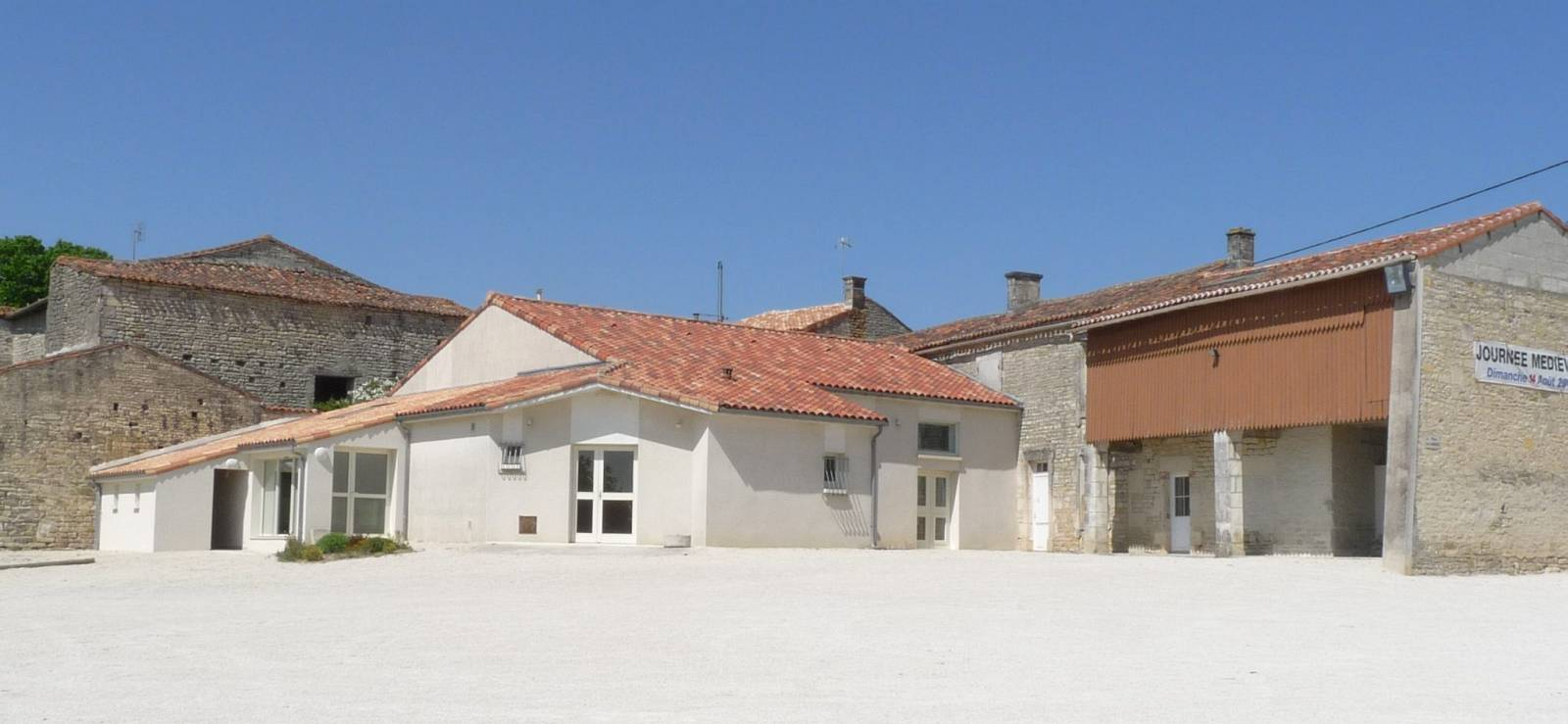 Salle communale de Ligné, Charente, France